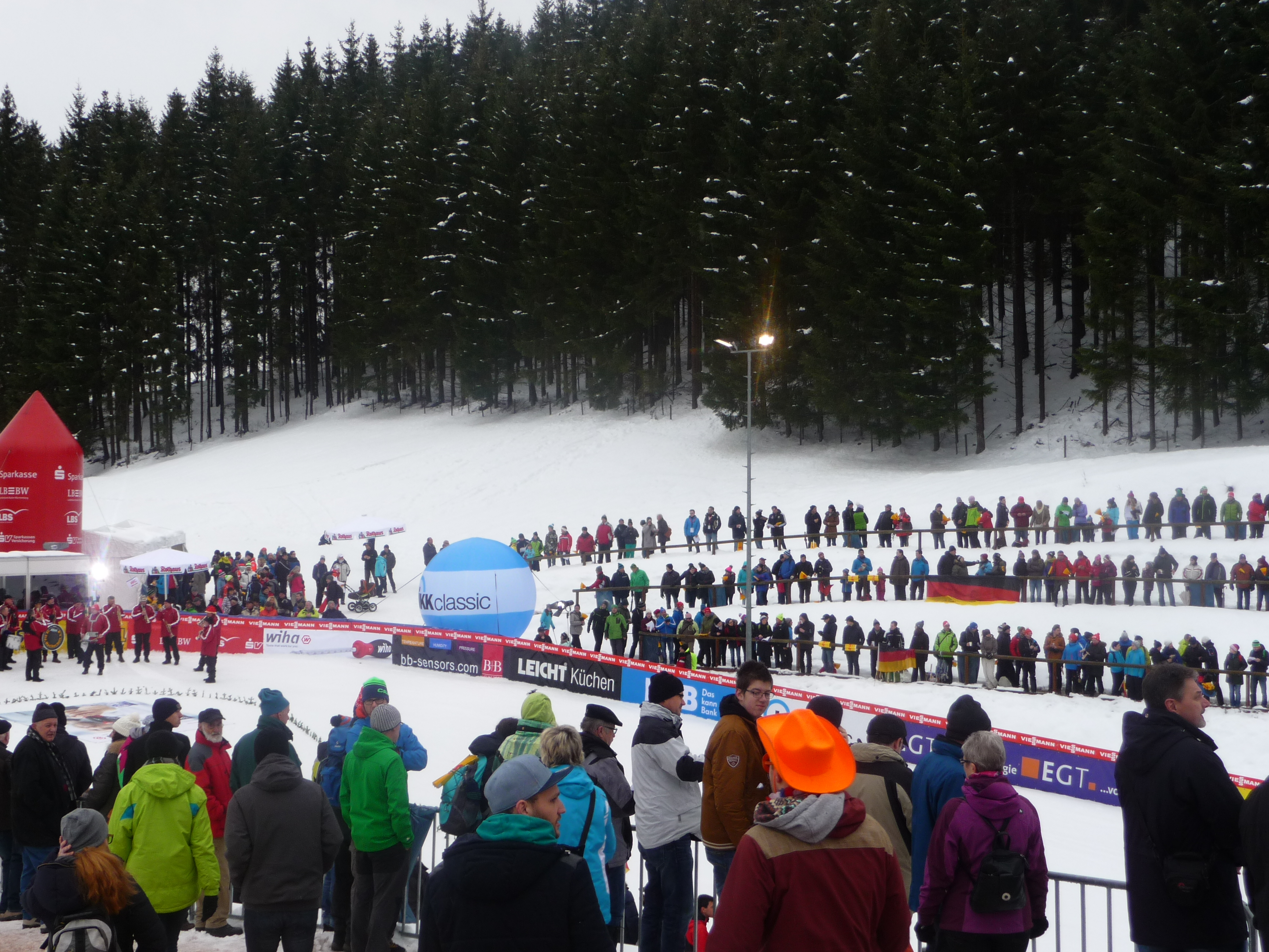 Weltcup Nordische Kombination 3. März 2016 in Schonach, Skispringen